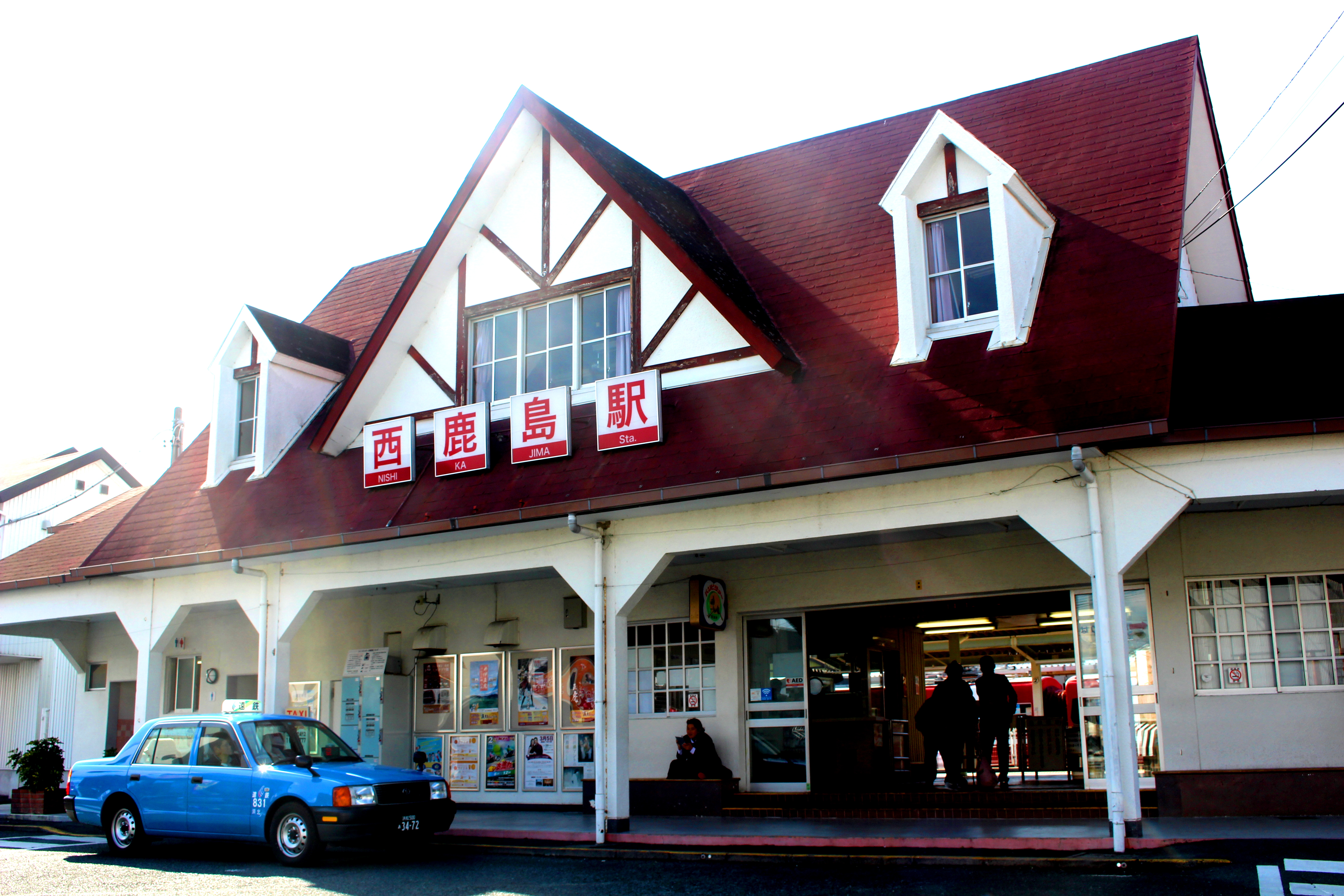 西鹿島駅の駅舎